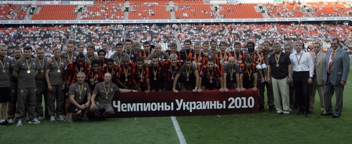 Шахтар чемпіон України 2010